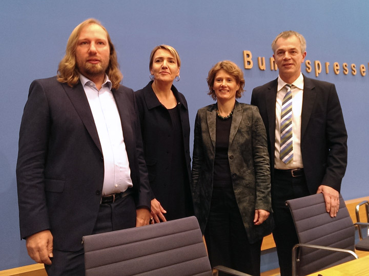 Bundespressekonferenz mit Anton Hofreiter, Simone Peter, Eveline Lemke und Johannes Remmel